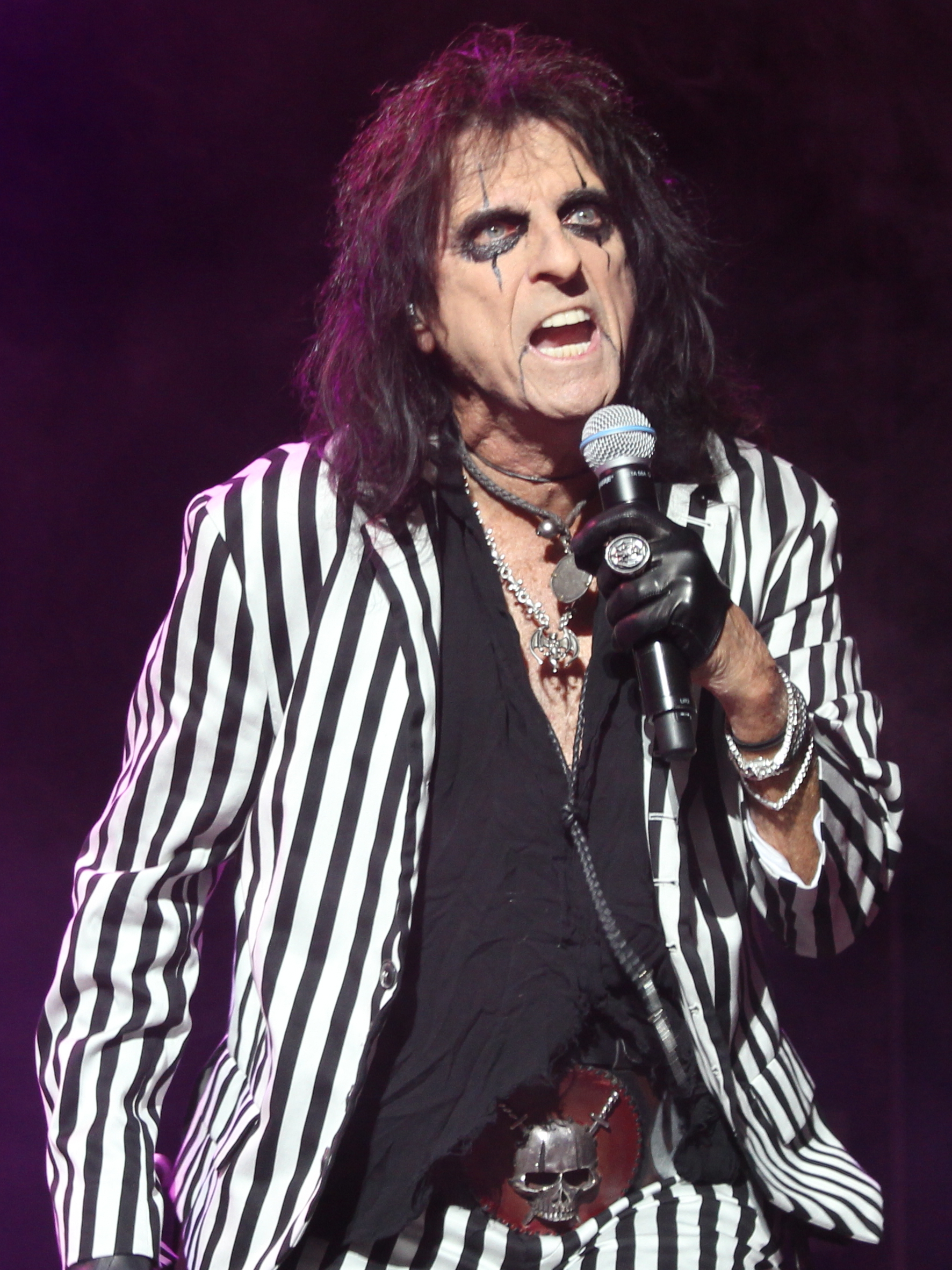 Festivalsommer This photo was created with the support of donations to Wikimedia Deutschland in the context of the CPB project "Festival Summer". Personality rights warningAlthough this work is freely licensed or in the public domain, the person(s) shown may have rights that legally restrict certain re-uses unless those depicted consent to such uses. In these cases, a model release or other evidence of consent could protect you from infringement claims.